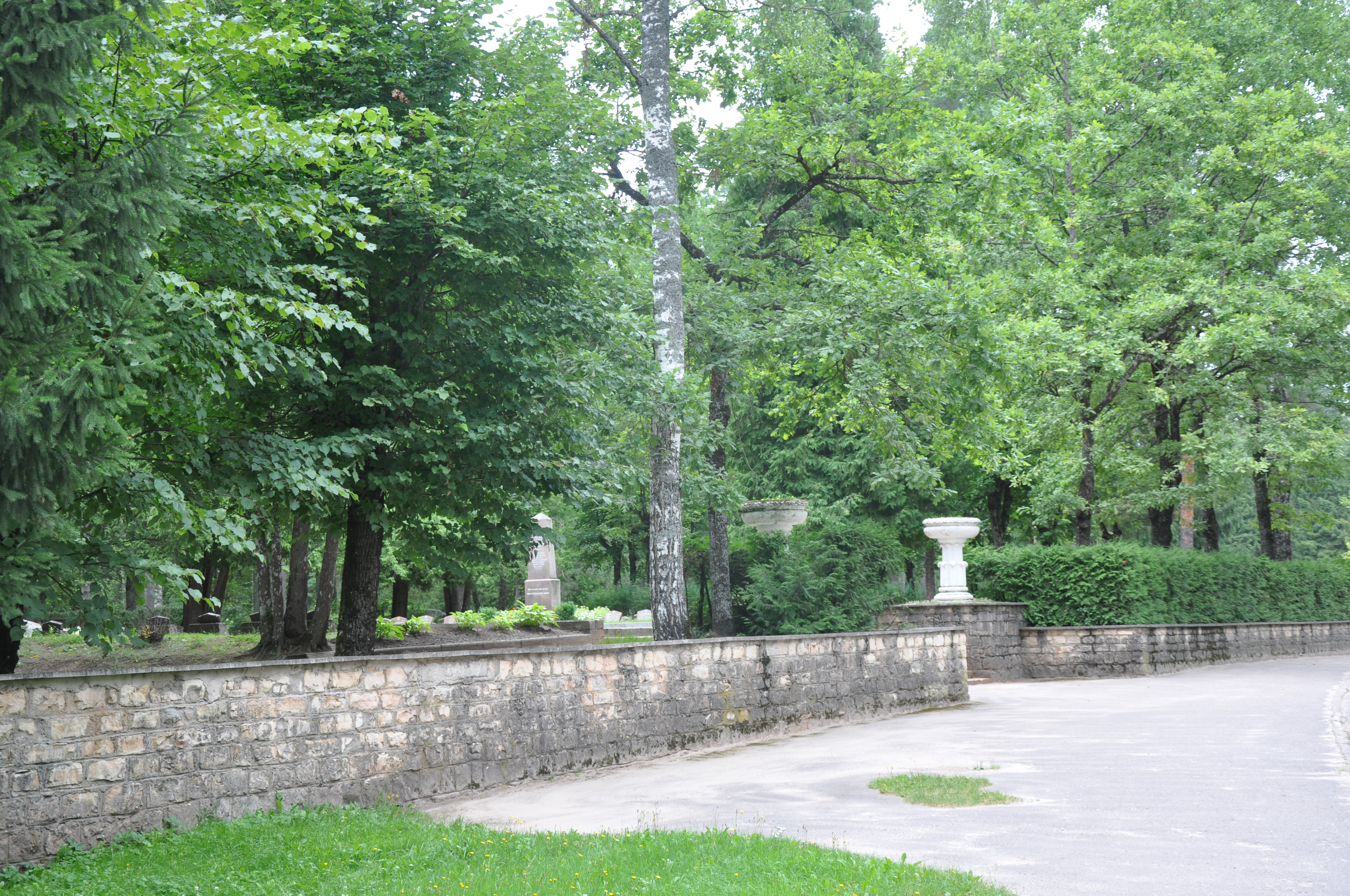 Brāļu kapi Ogrē (WWI, WWII), Ogre, Latvia